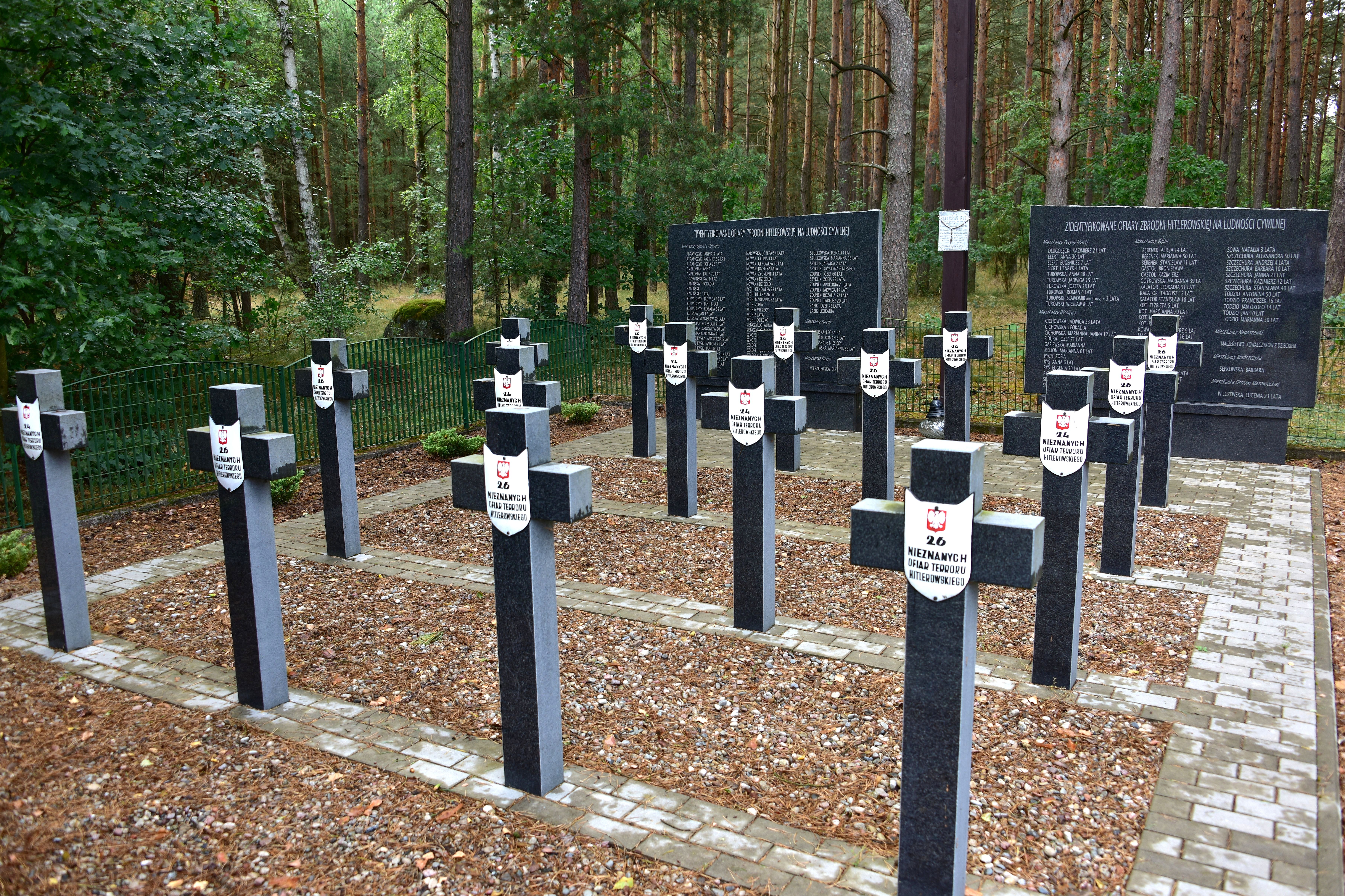 Upamiętnienie pacyfikacji wsi Lipniak-Majorat